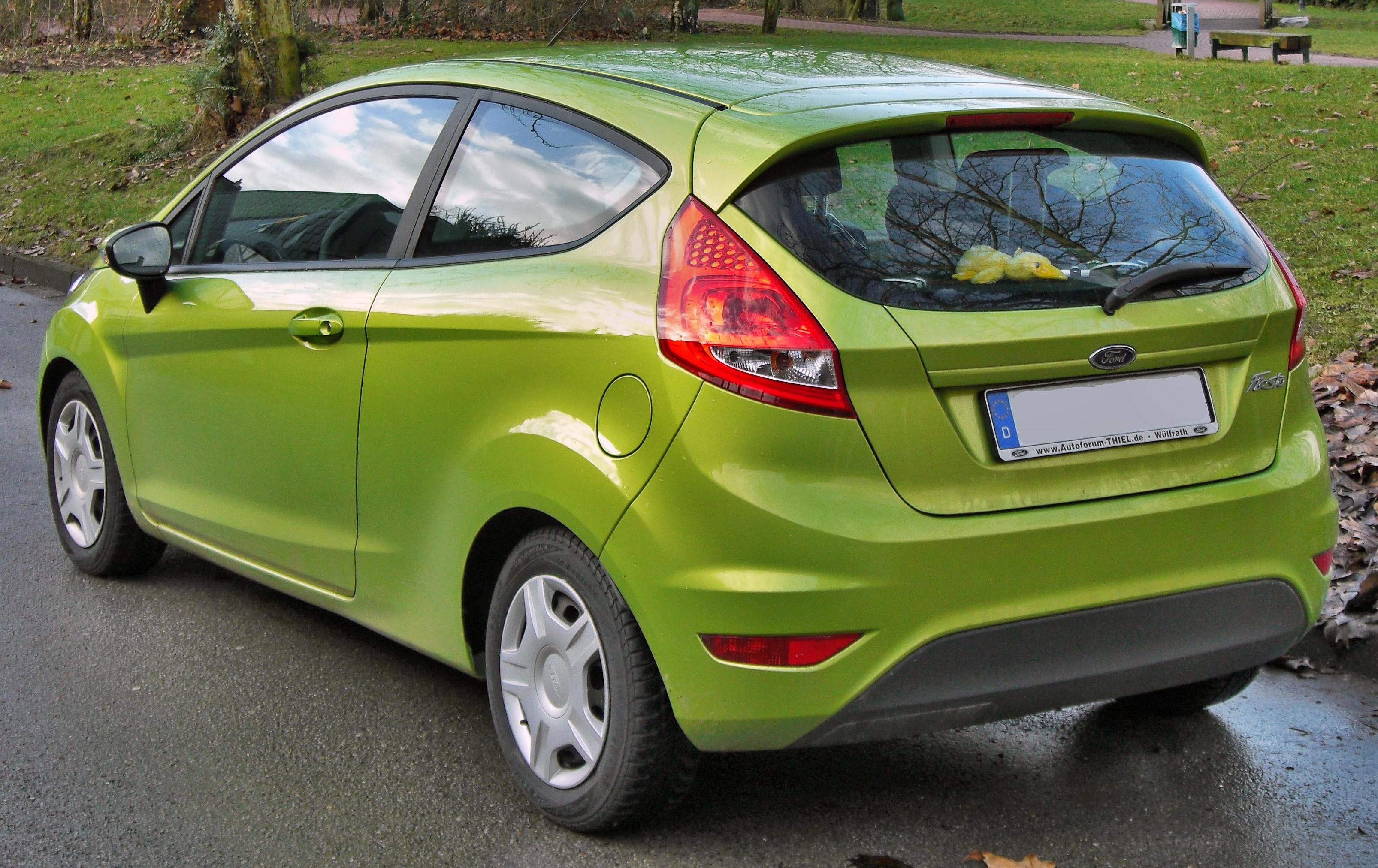 Ford Fiesta VI Trend